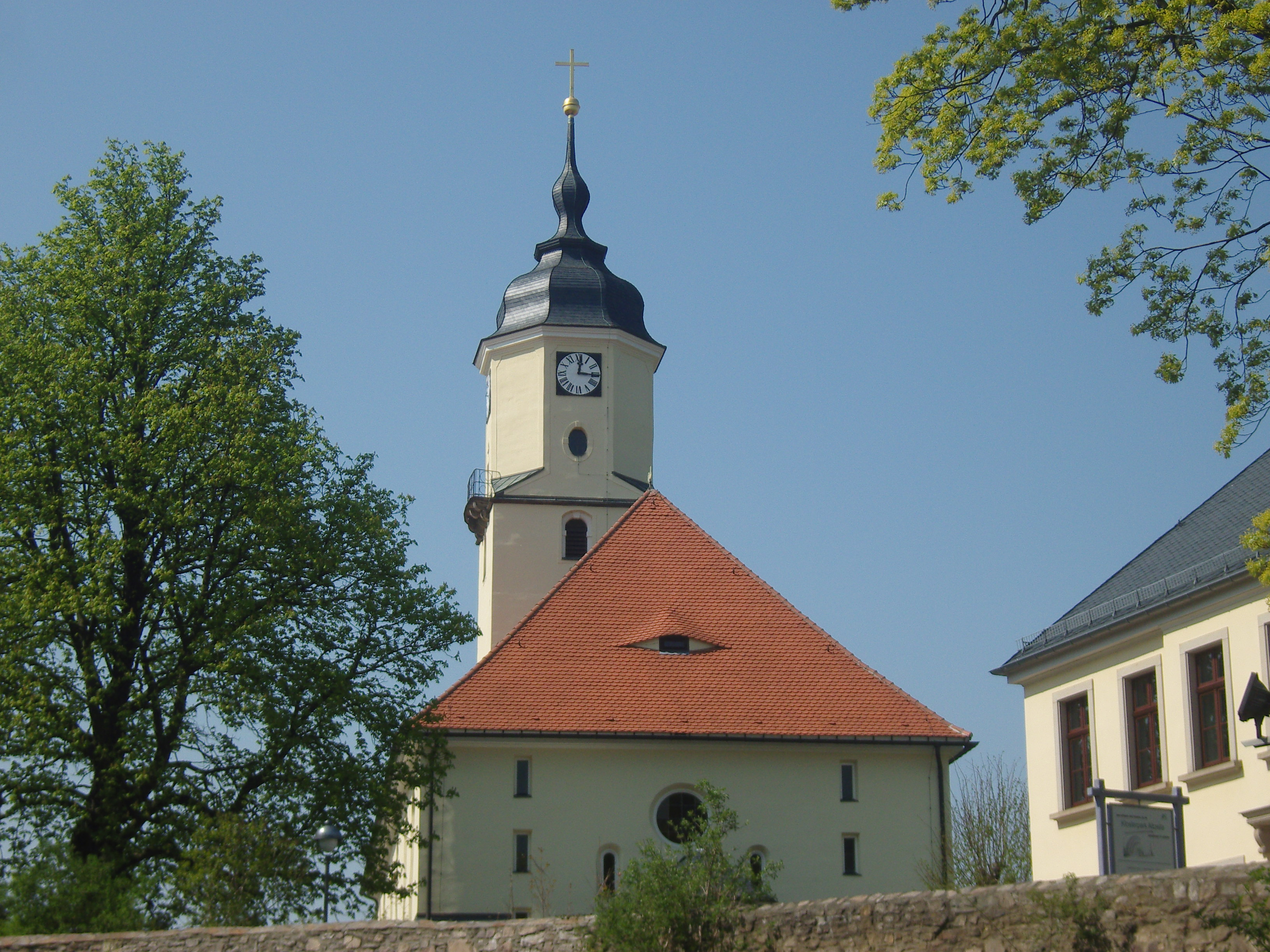 Kirche in Nossen